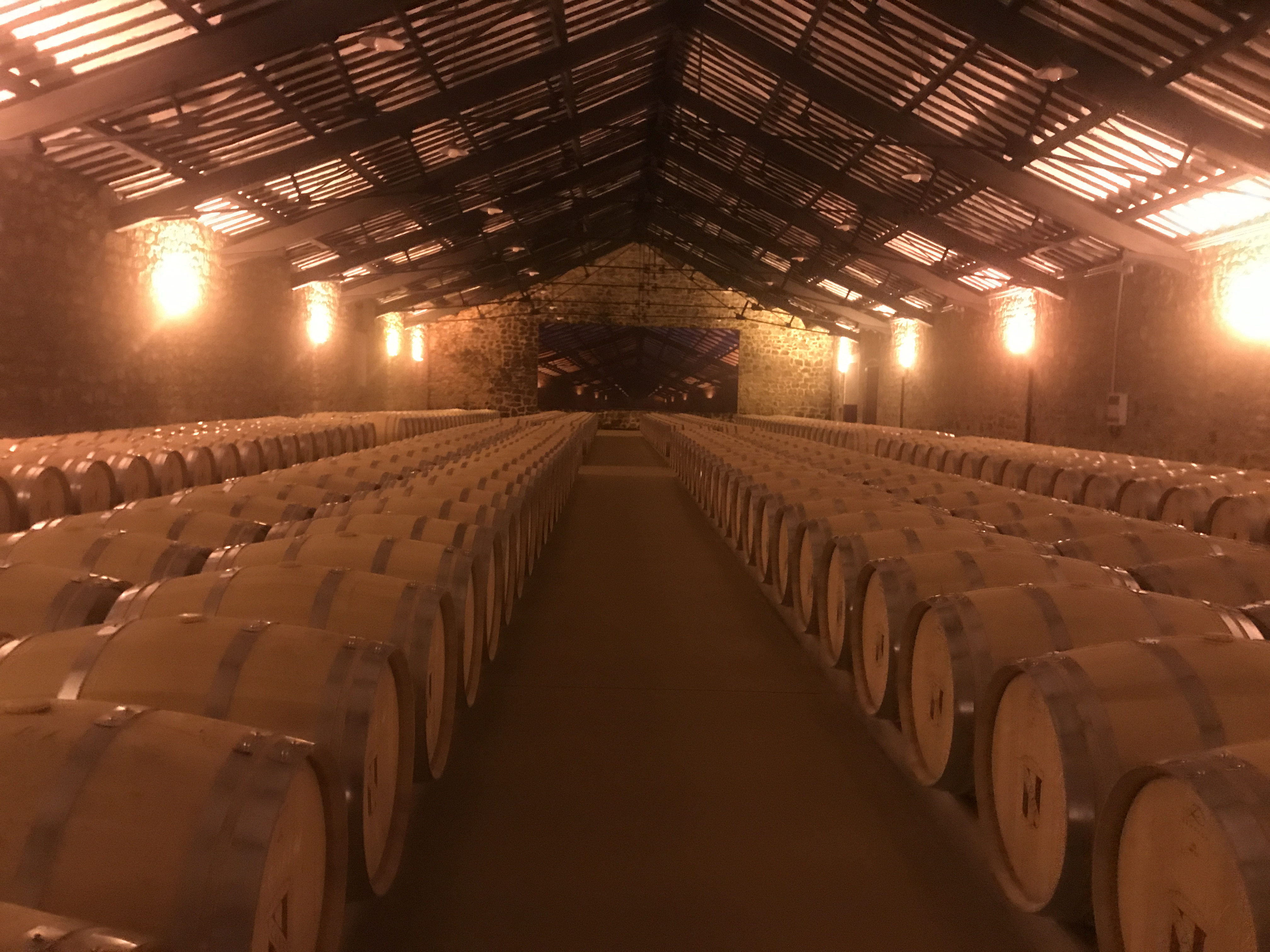 Nave Eiffel instalación vinícola de CVNE en Haro, La Rioja (España). Nave construida por Aleixandre Gustave Eiffel entre 1890 y 1909. Se trata de una importante estructura con una innovadora fórmula de sujeción. Sin columnas, el techo se sostiene mediante cerchas metálicas , que van de pared a pared.